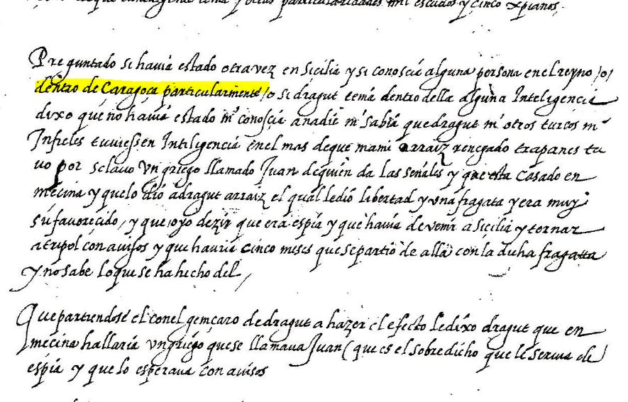 Deposizione rinnegato di Candia (impero turco, spagnoli), 1562, 1563. Servizio di spionaggio, sospetti sulla città di Caragoca de Sicilia (alias Siracusa).